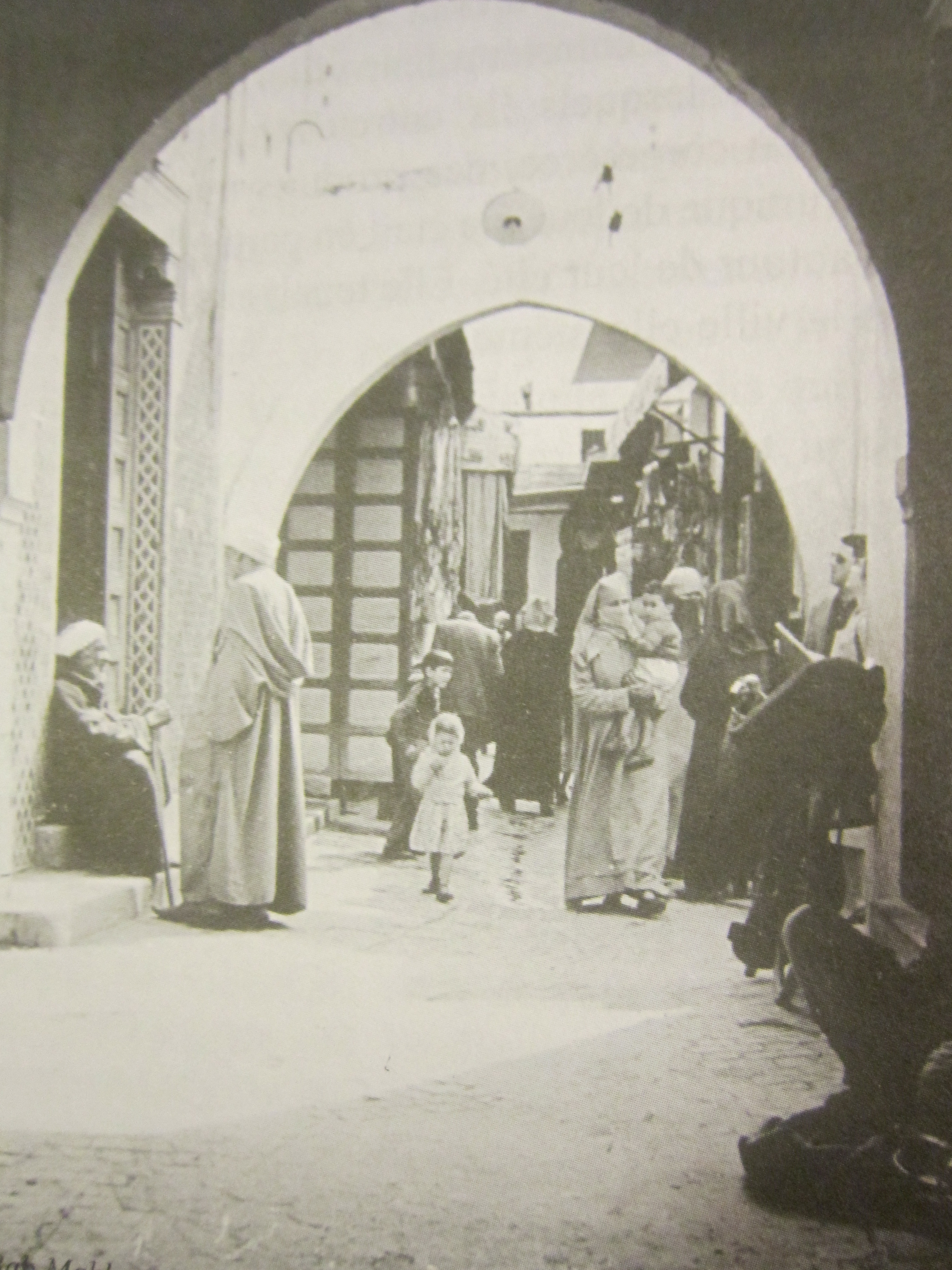 Dar ElQadi médina de Salé